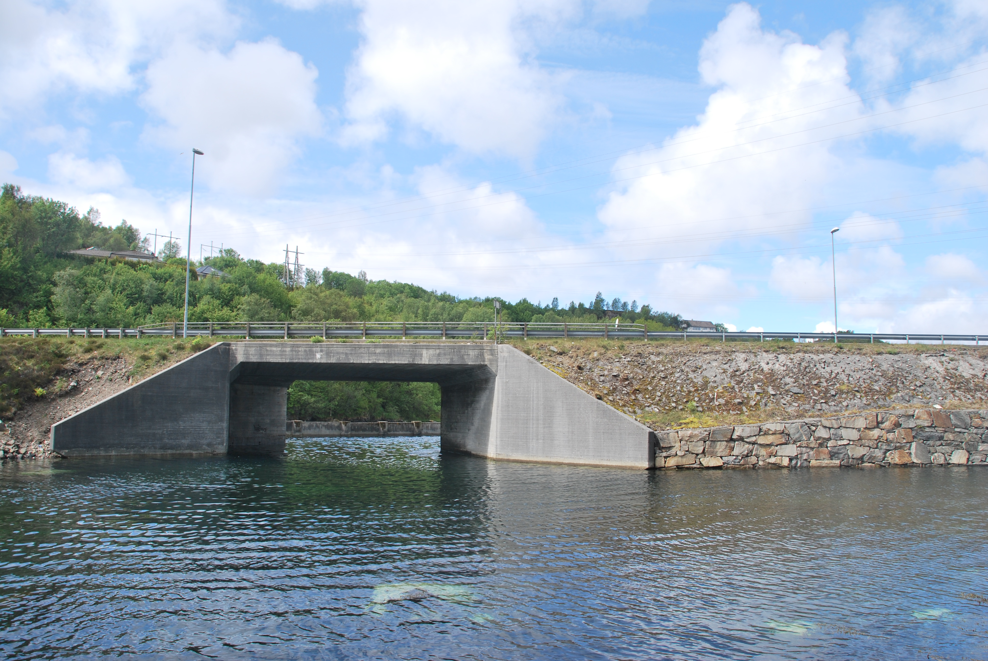 Bildøybroen på Sotra.